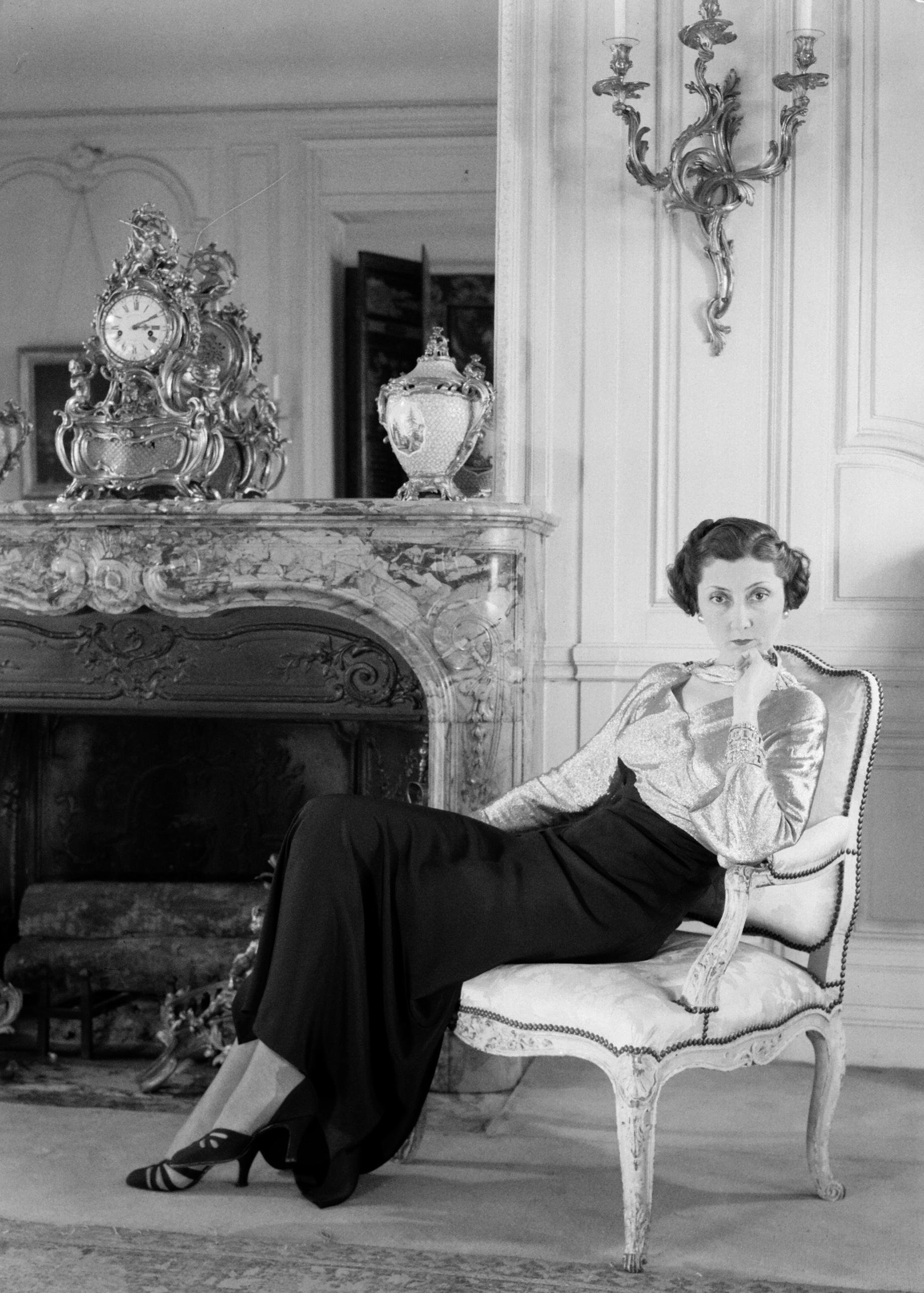 Collectie / Archief : Fotocollectie Van de Poll Reportage / Serie : Gravin van Parijs Beschrijving : De gravin van Parijs poseert in een hôtel in Parijs in een japon van Paquin Datum : 1936 Locatie : Frankrijk, Parijs Trefwoorden : interieurs, vrouwen Persoonsnaam : Isabelle Marie-Allure Victoire (prinses van Orleans), Paquin Fotograaf : Poll, Willem van de Auteursrechthebbende : Nationaal Archief Materiaalsoort : Negatief (zwart/wit) Nummer archiefinventaris : bekijk toegang 2.24.14.02 Bestanddeelnummer : 255-8723